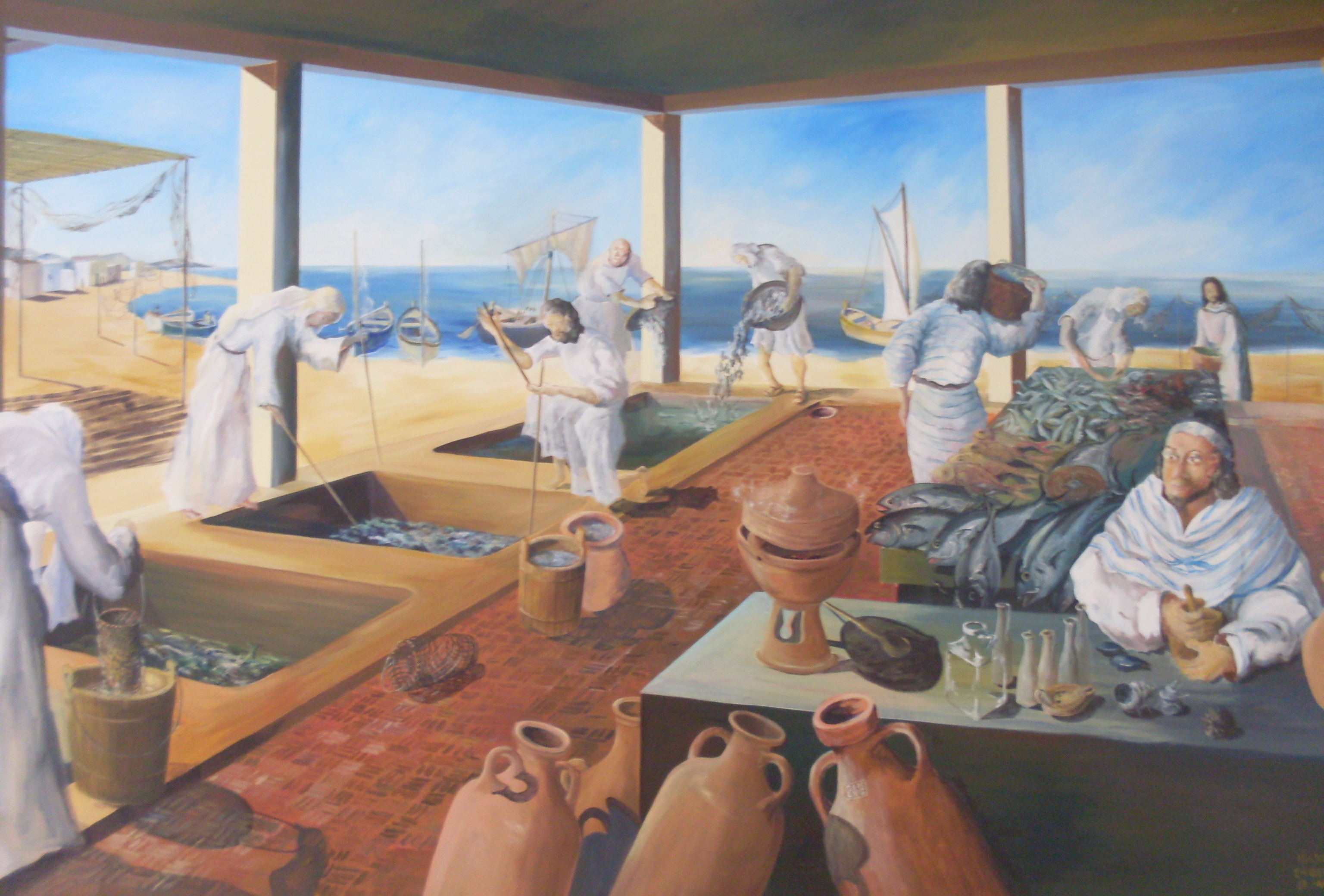 Peinture illustrant l'usine de salaison exposée au musée archéologique de Nabeul